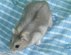 phodopus sungorus